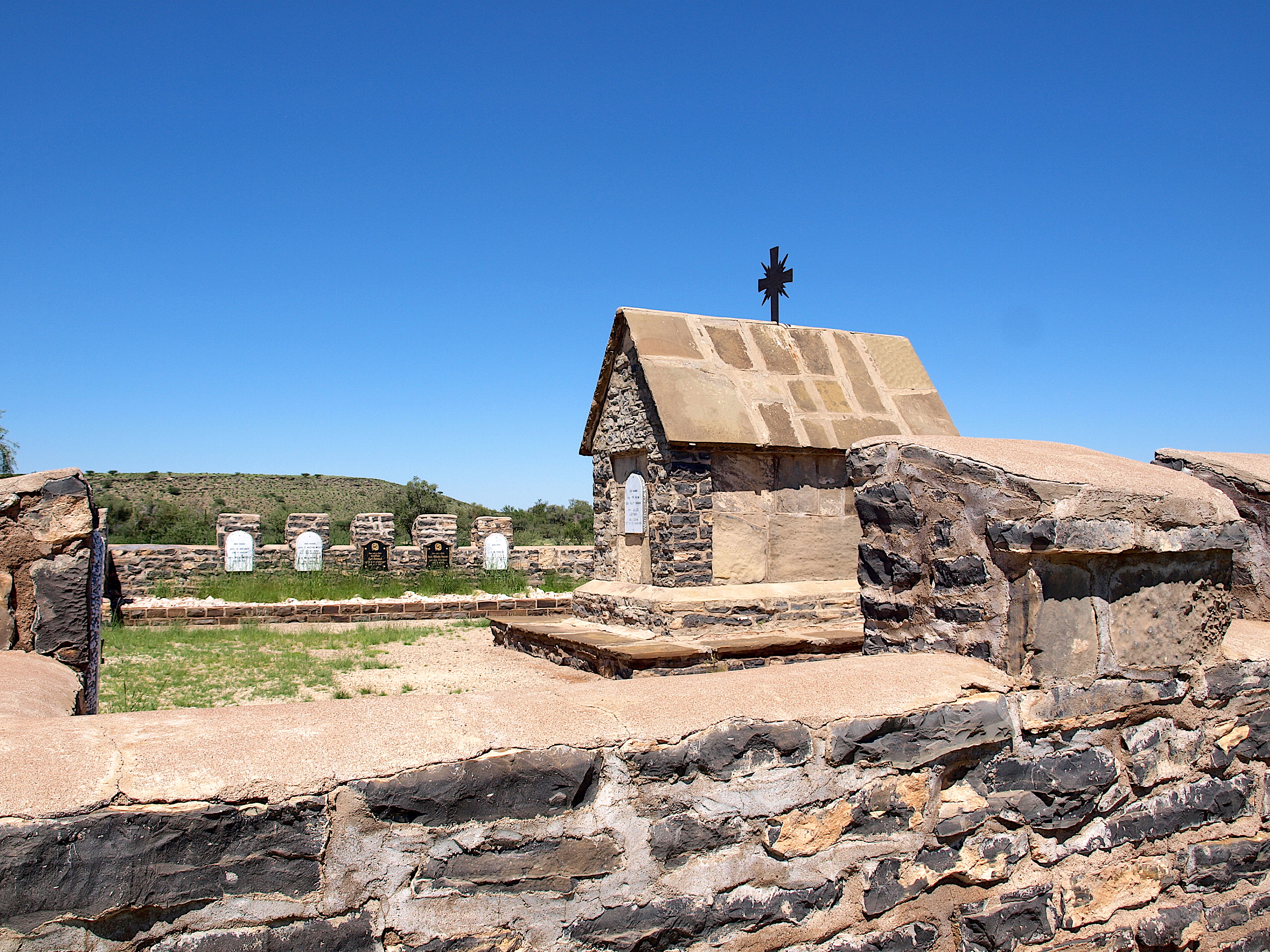 Kriegsgrabstätte Helmeringhausen